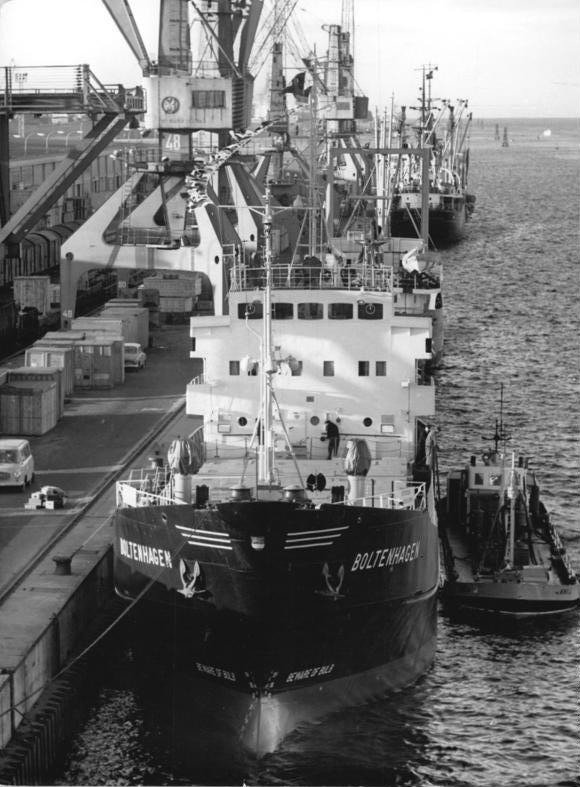 Rostock, Überseehafen, Frachter, Schlepper Zentralbild Sindermann 24.10.70 Rostock: Containerschiff Boltenhagen mit Elektronik-Auge. Das erste Spezial-Containerschiff , das auf der Elbewerft Boizenburg-Roßlau erbaut wurde, ist gestern an die Deutsche Reereederei übergeben worden. Es ist für den Linienverkehr zwischen Rostock und London-Tilbury bestimmt. Die Maschinenanlage ist weitgehend automatisiert. Sie kann 24 Stunden lang ausschließlich von "elektronischen Augen" bewacht werden. Eine Besatzung von sieben Mann reicht aus.